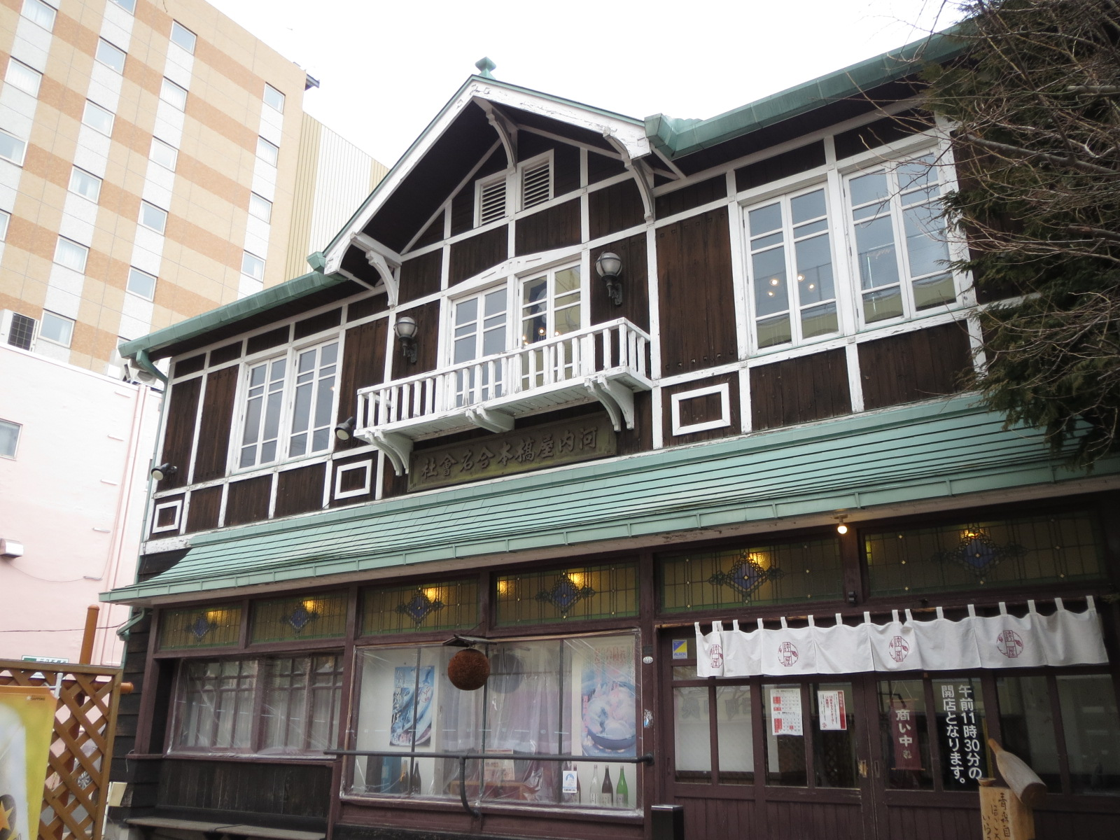 旧河内屋橋本合名会社 Canon IXY 3